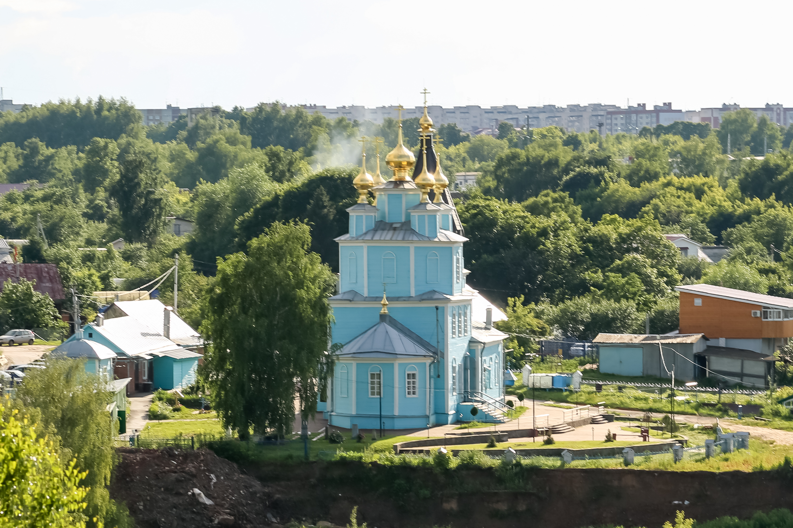 Церковь Казанской Иконы Божией Матери (деревянная): Великий Враг, Кстовский район, Нижегородская область